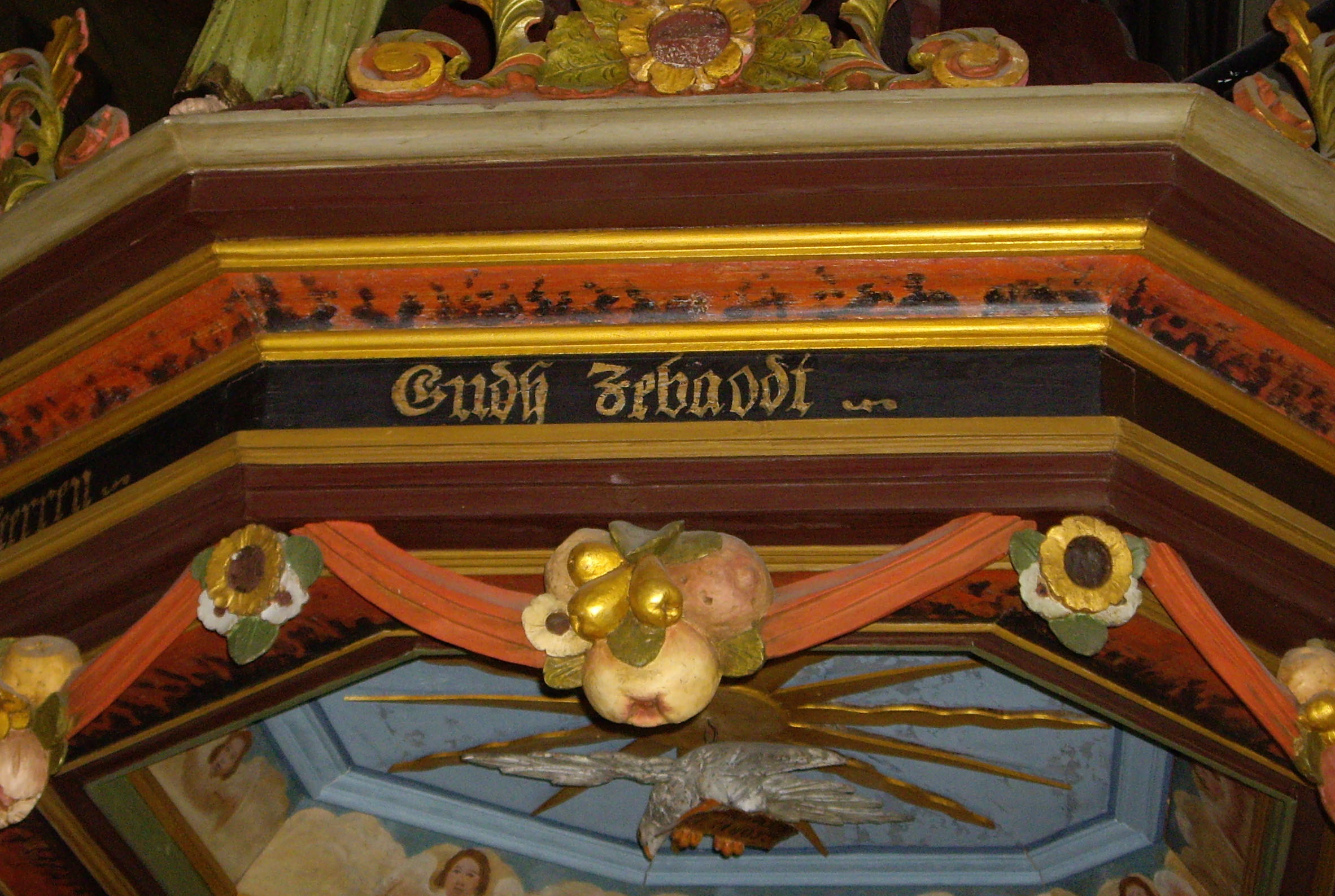 Predikstolens baldakin i Kållereds gamla kyrka, med texten "Herren Gudh Sebaodt"